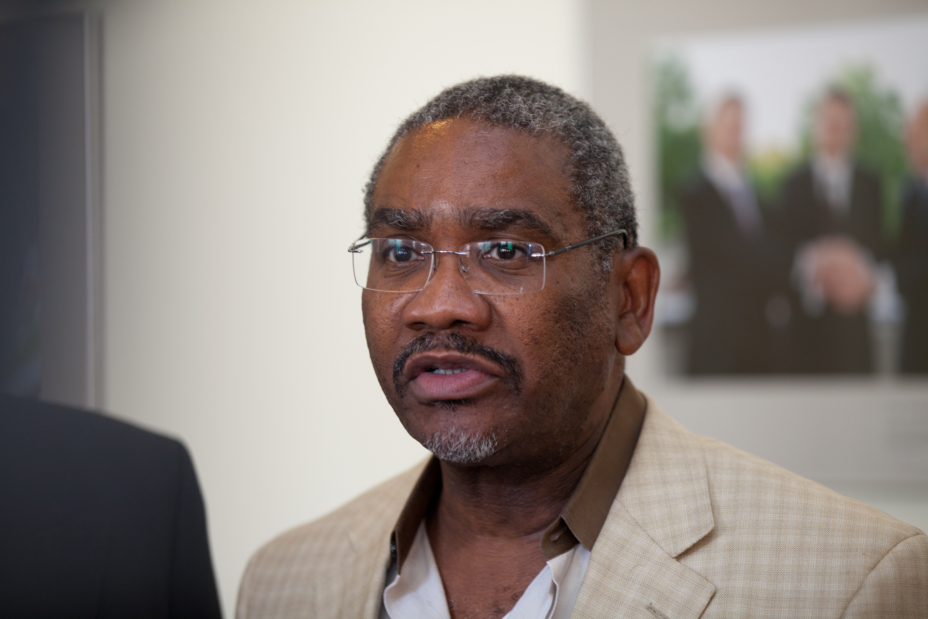 Gregory Meeks.